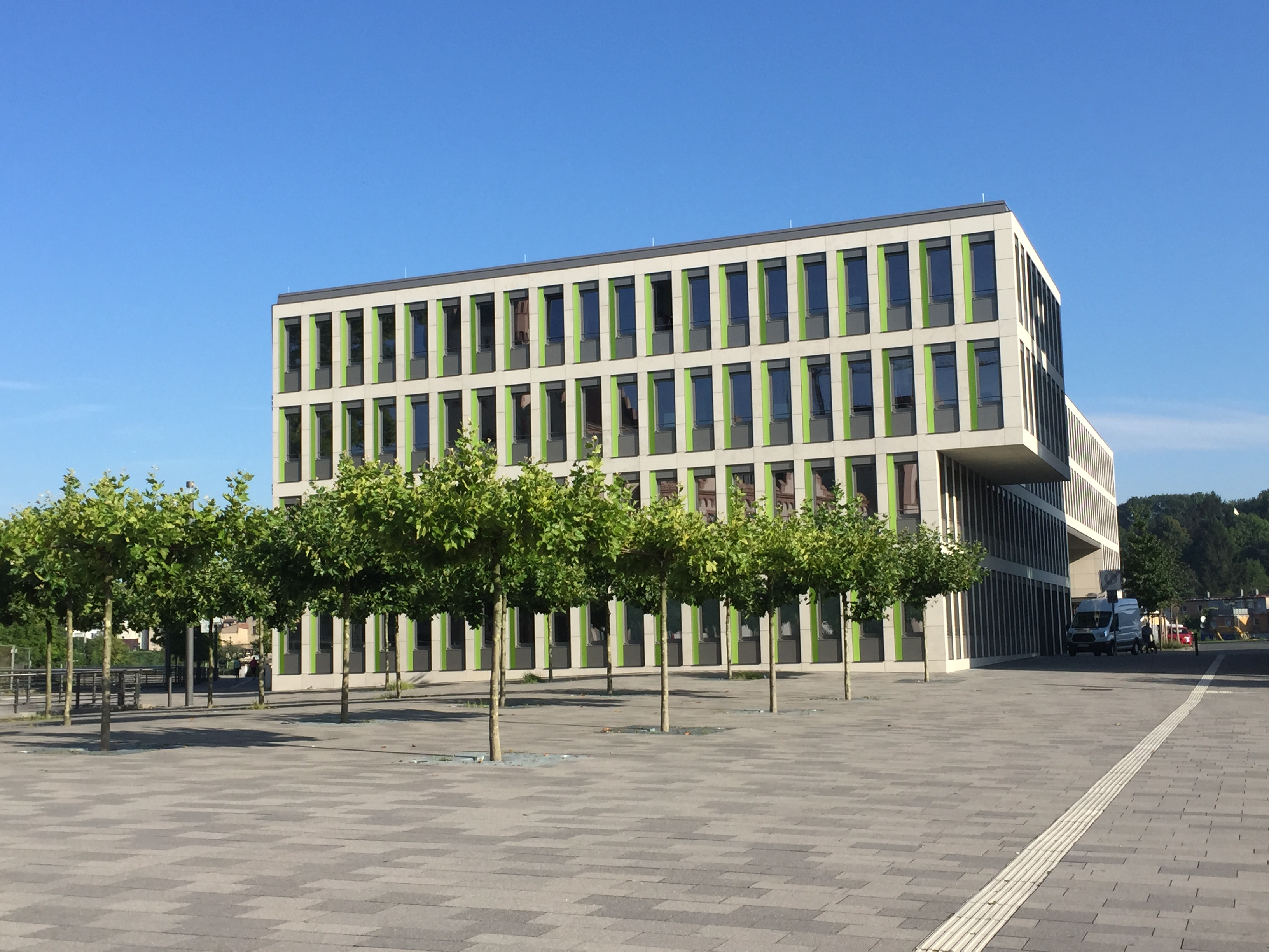 IT-Zentrum Zalando Phoenixsee Dortmund